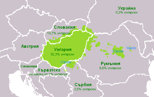 Унгароговорещи райони в Европа; Мофифициран вариант на файла Dist_of_hu_lang_europe.png от английската уикипедия